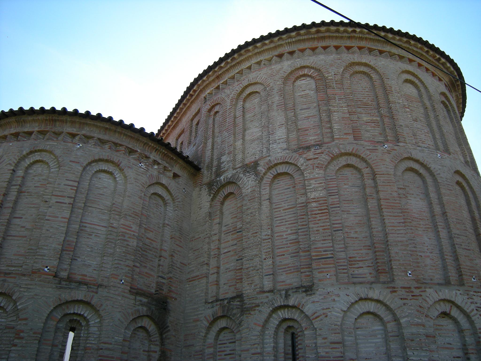 Esta foto participó en el juego En un lugar de Flickr.